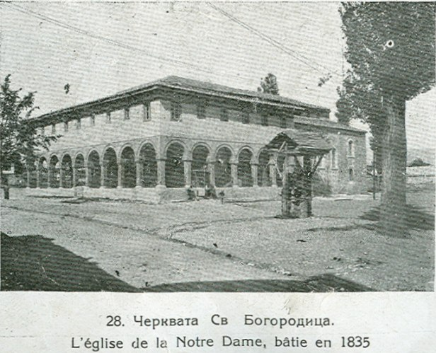 Church St. Bogorodica, Skopie